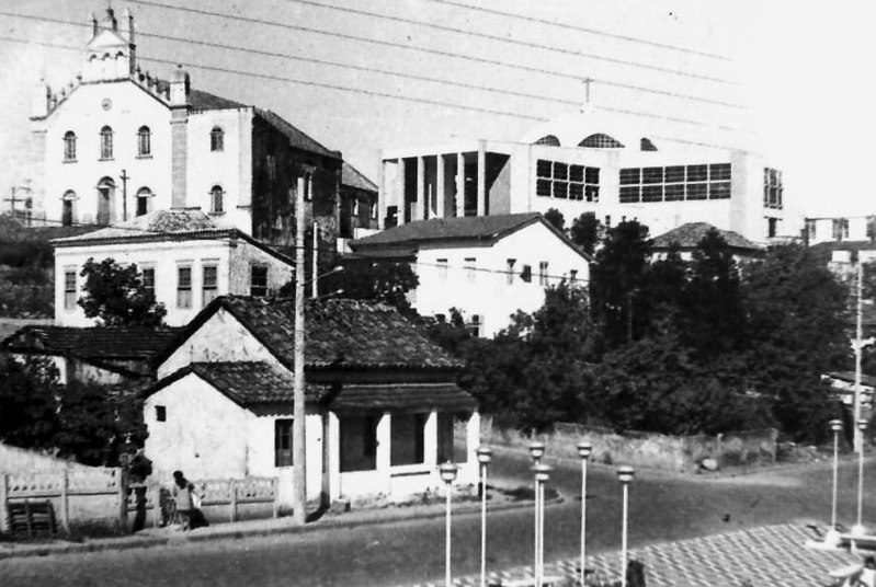 Antiga e Nova Catedrais de Tubarão. Fotografia digitalizada disponível no Arquivo Público e Histórico Amadio Vettoretti, Tubarão, Santa Catarina.